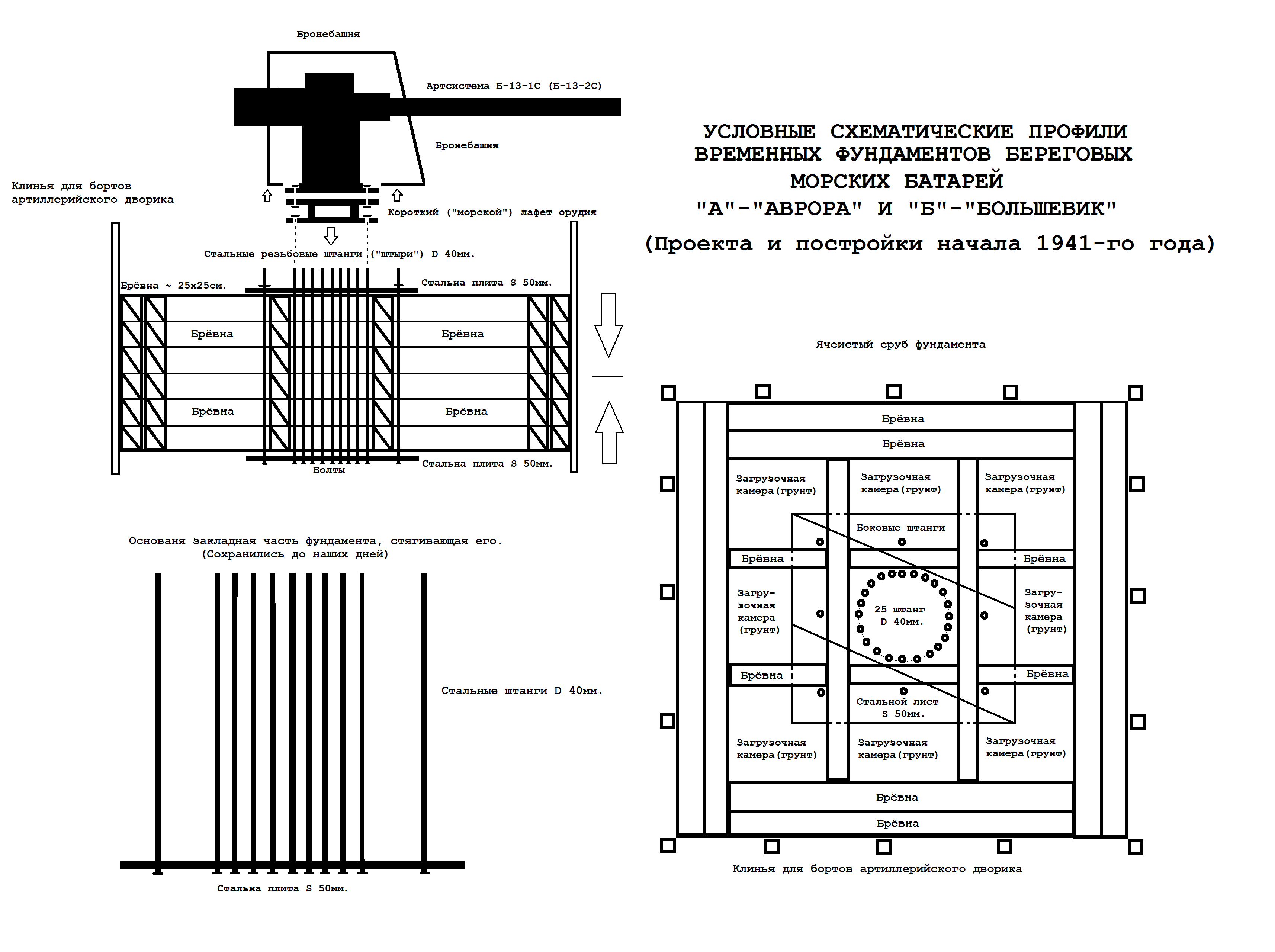 Профиль фундамента артсистемы Б-13 1941 г.